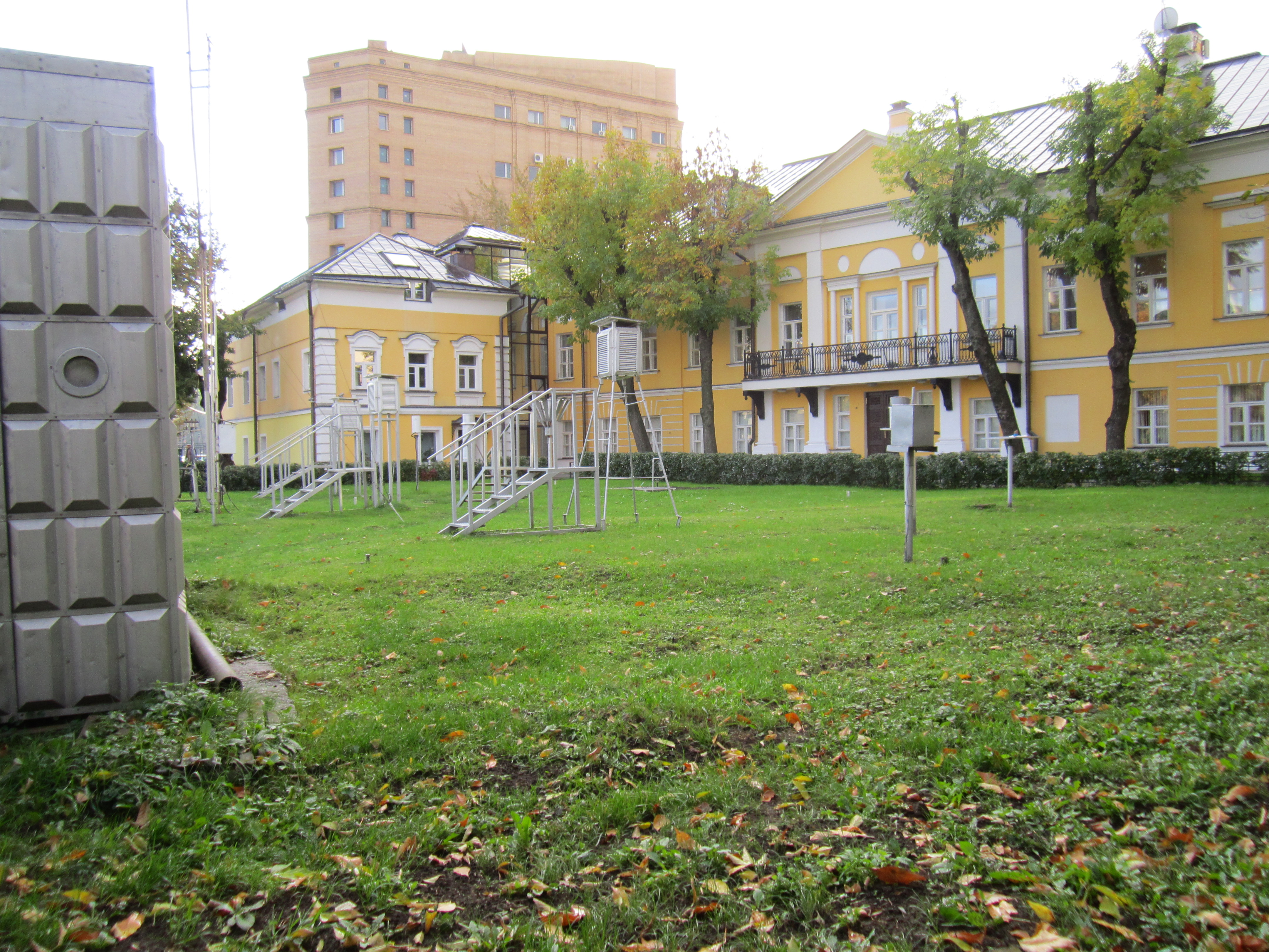 жилой дом XVIII в. купца Ивана Емельянова, перестроенный в XIX в.; во дворе — метеостанция